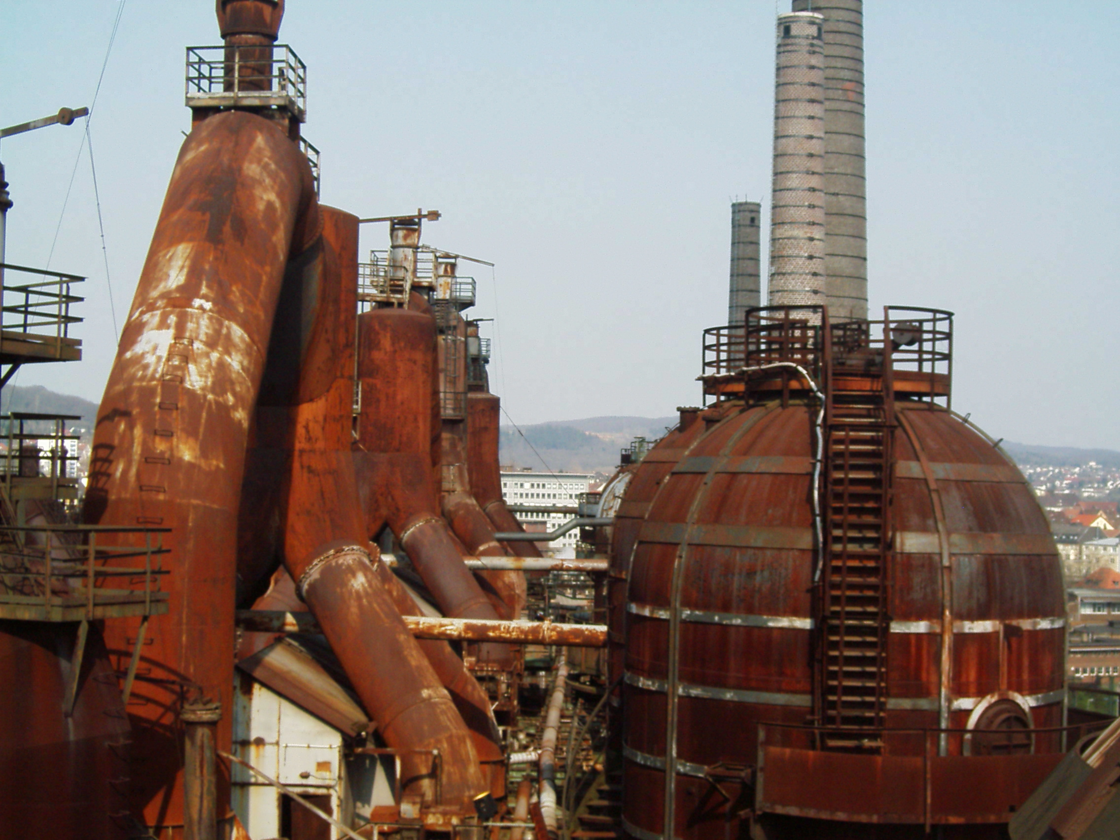 Vue des Hauts-Fourneaux depuis la plate-forme panoramique de la Völklingen Hutte.